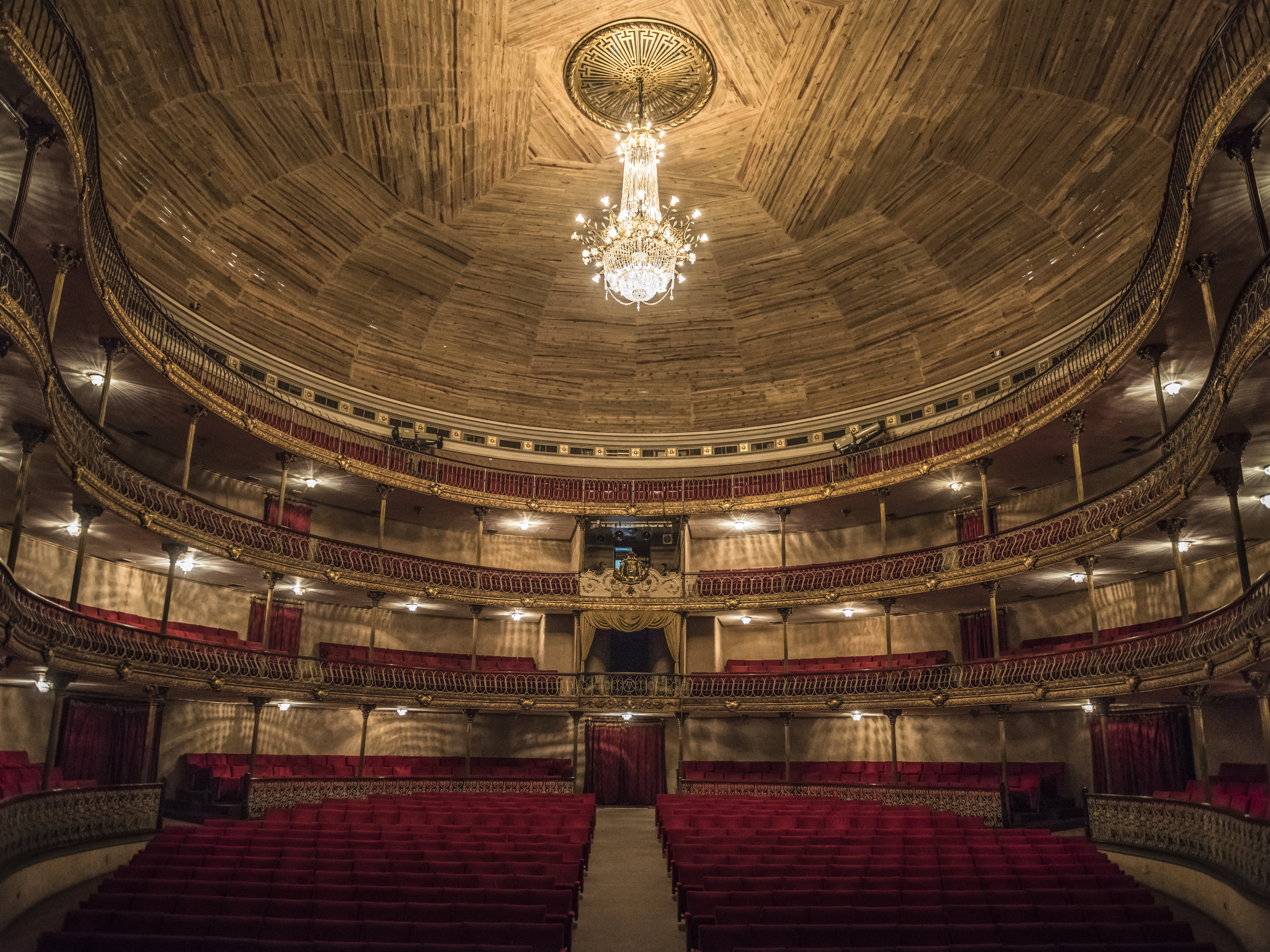 Interior del Teatro Municipal de Caracas, Venezuela.